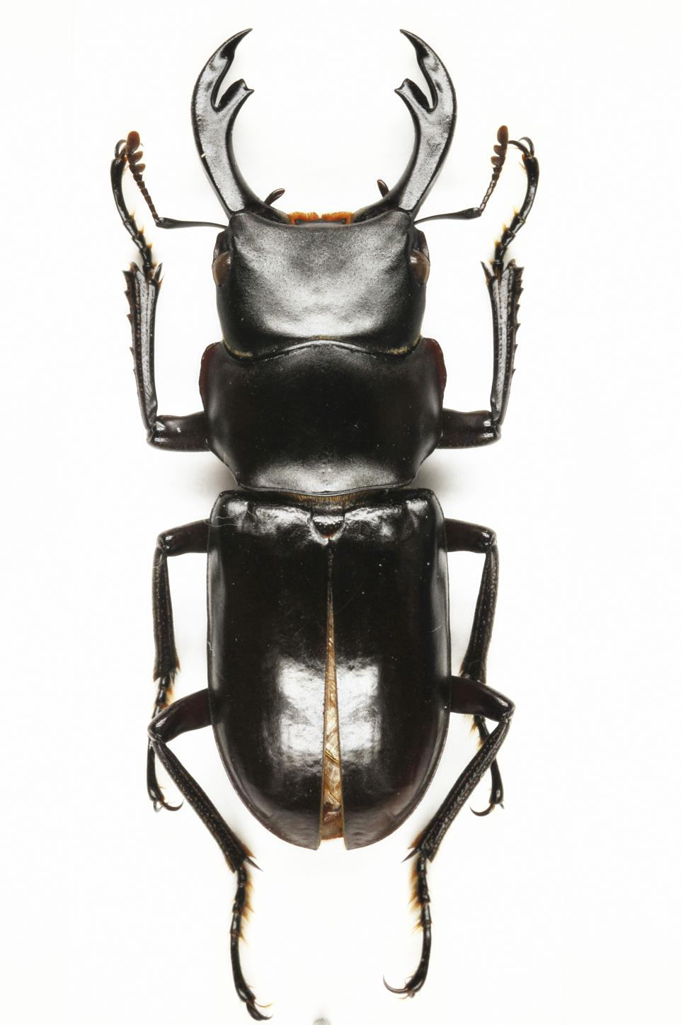 Imagen superior del Macrodorcas costipennis (= Digonophorus costipennis Nagai, 2000)